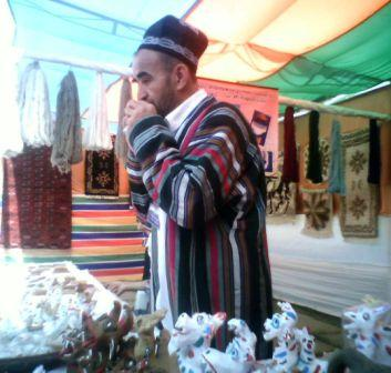 Ремесленнник писюлек - Истравшан 2011